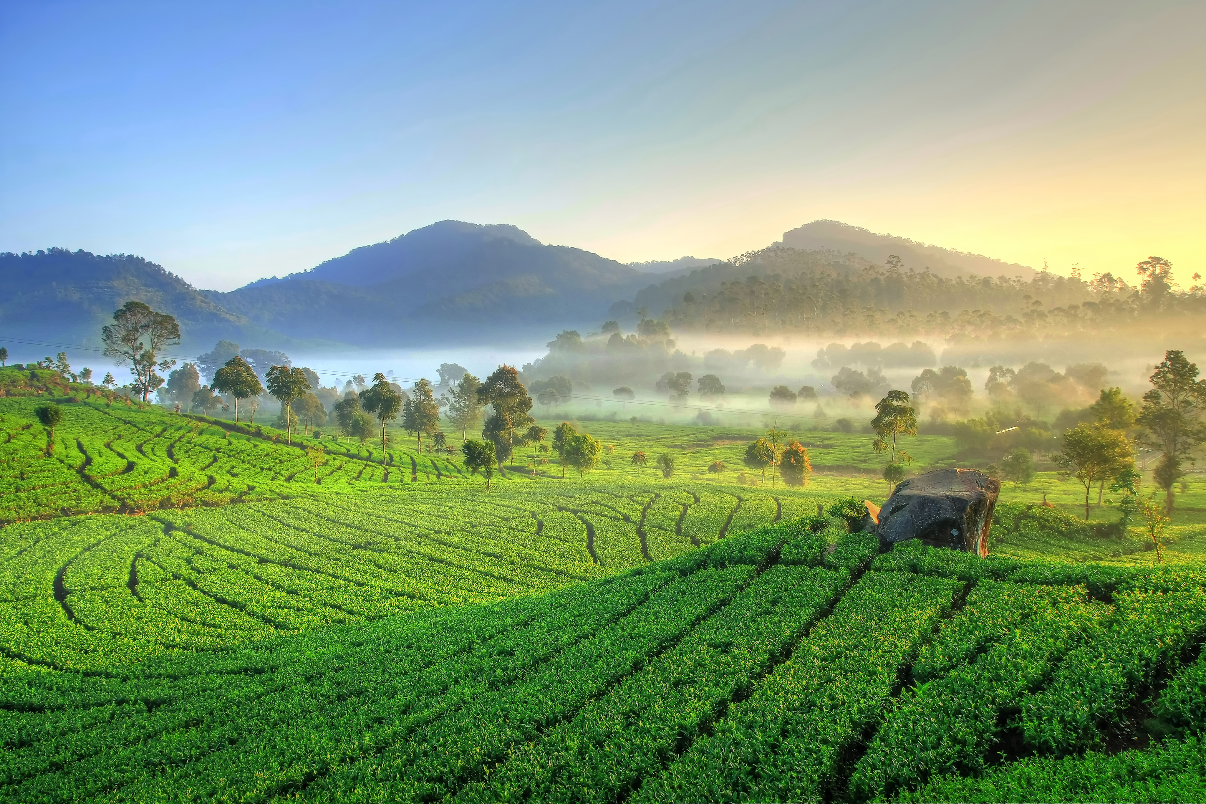 Salah satu perkebunan teh yang indah yang terdapat di daerah Rancabali Ciwidey, Bandung, Jawa Barat Indonesia